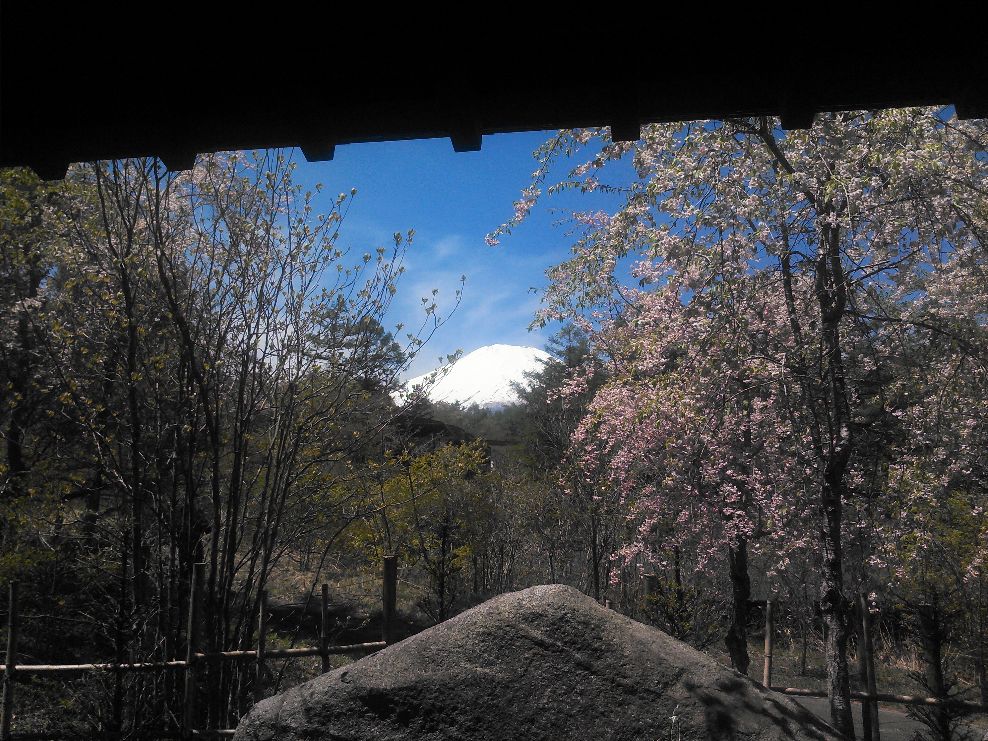 山中湖 文学の森公園の風生庵からの富士山の眺め